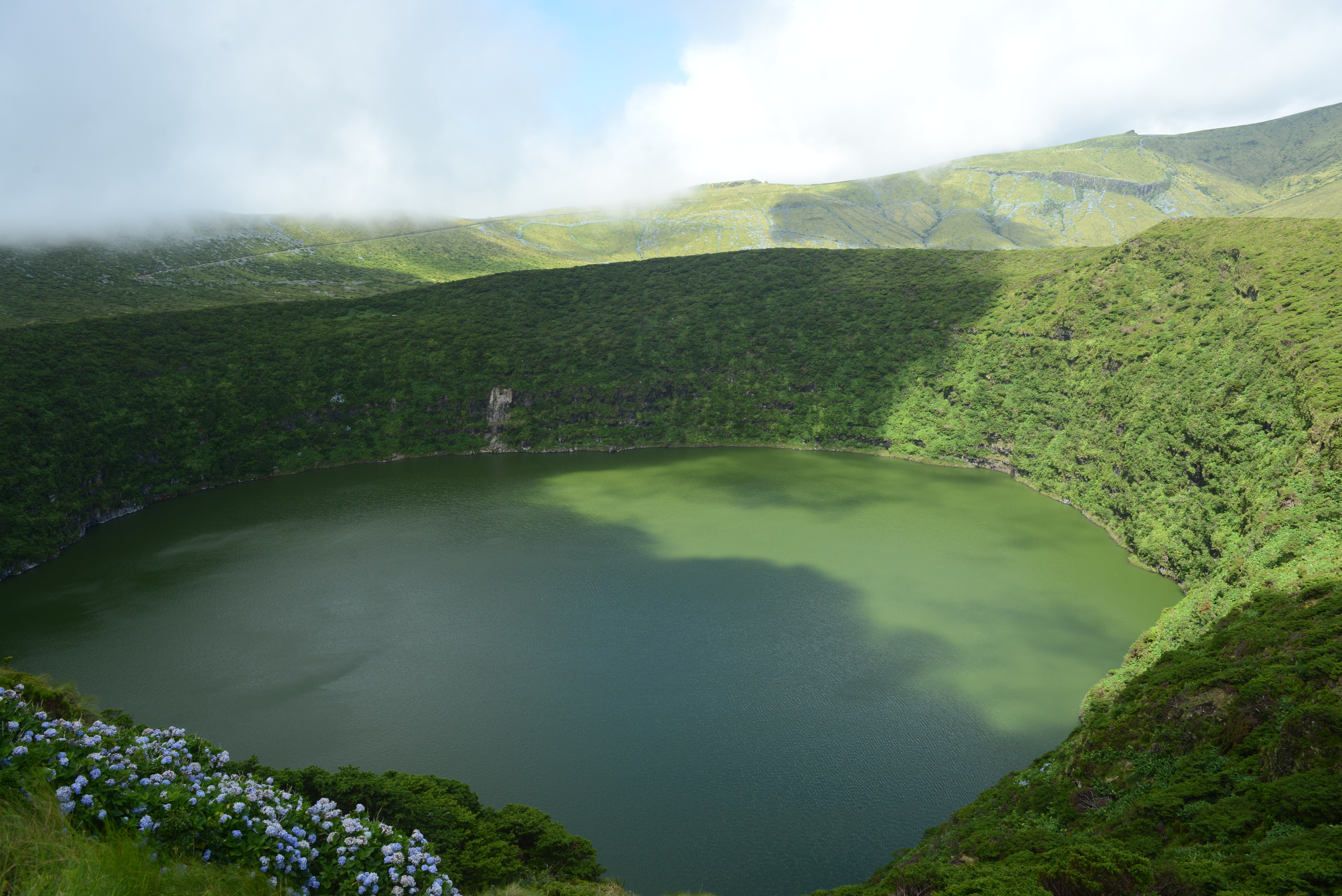 Lagoa Negra: lago vulcanico nell'omonima caldera, isola di Flores, Azzorre.